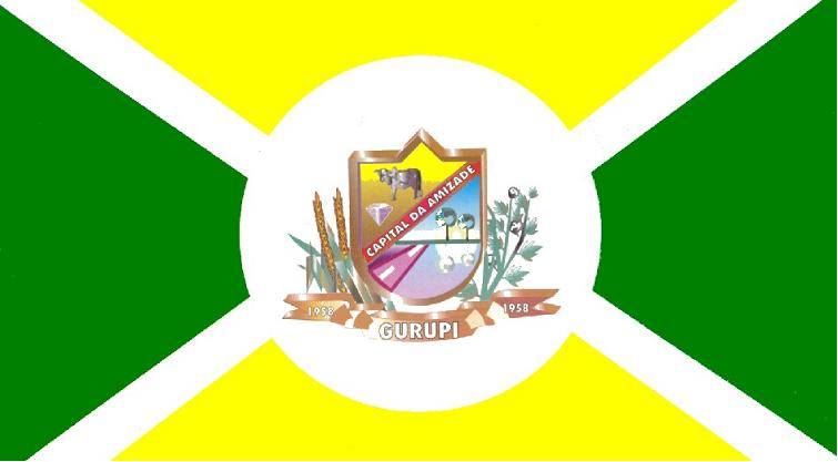 Bandeira do município de Gurupi